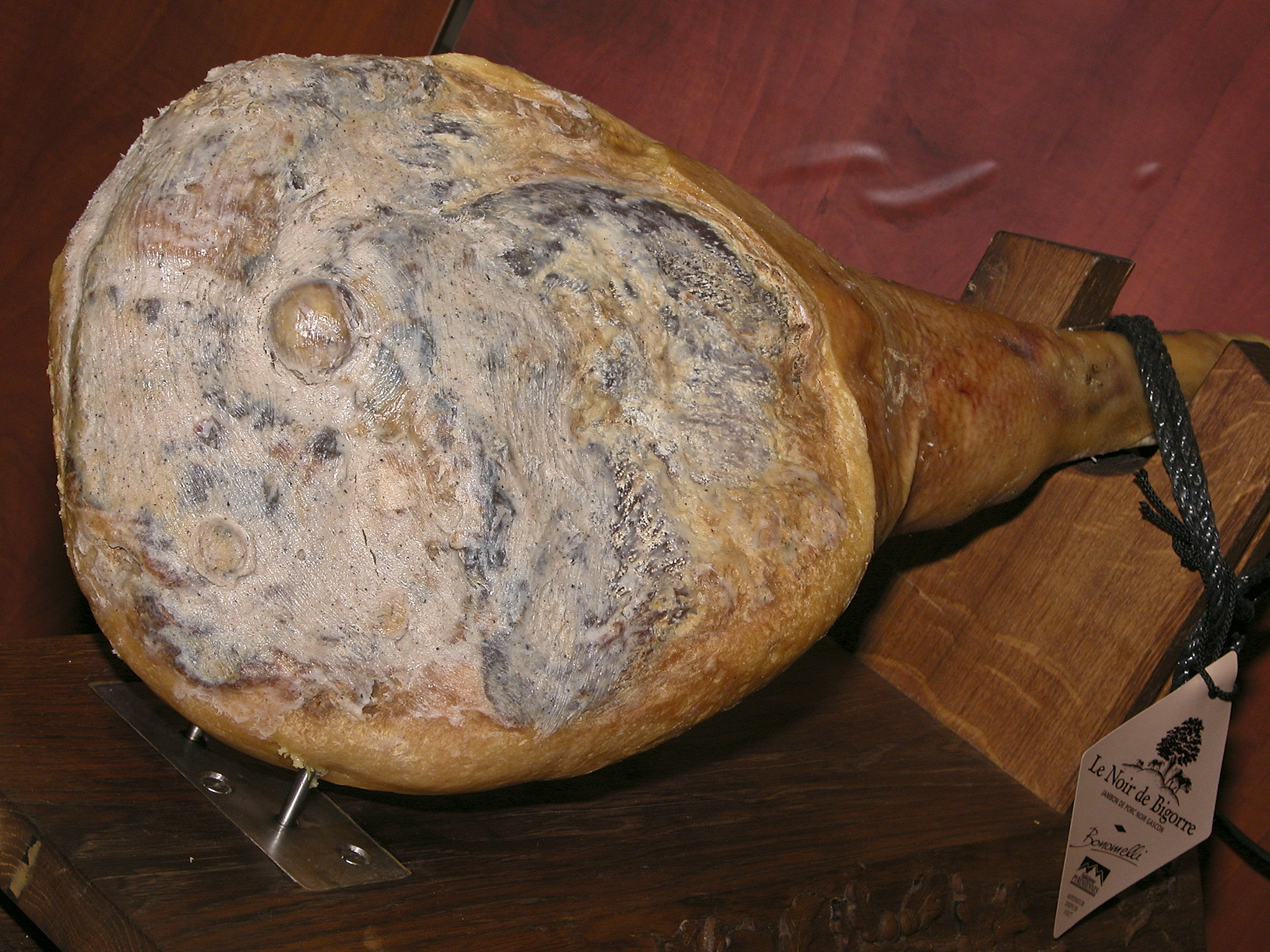 Jambon de porc noir gascon